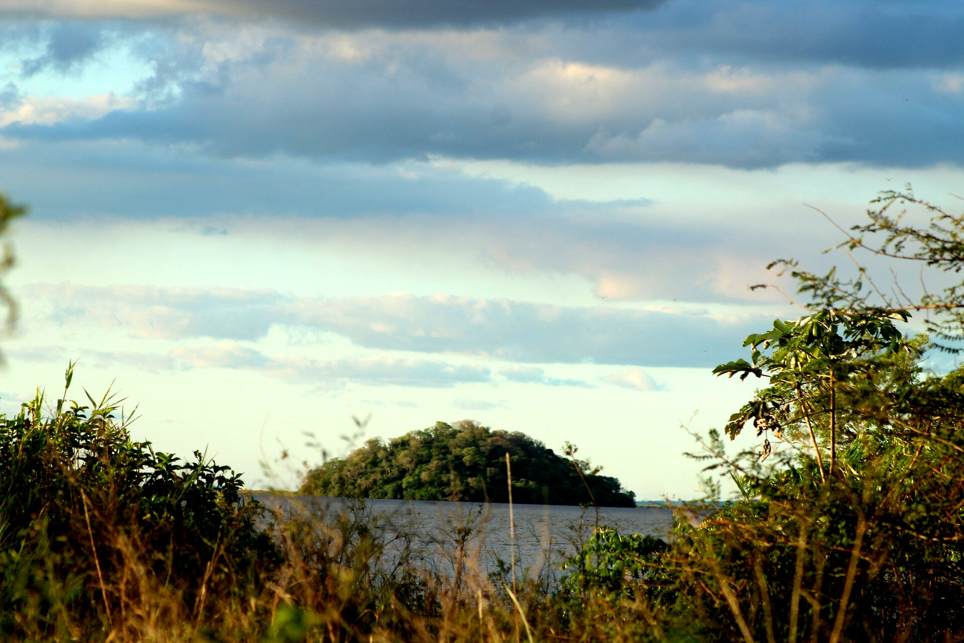 Isla flotante